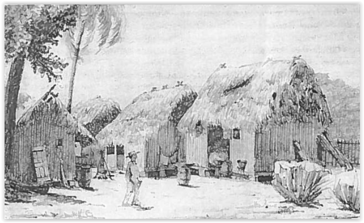 Pallisadehutten te Batavia, Suriname, J. Lens, 1895